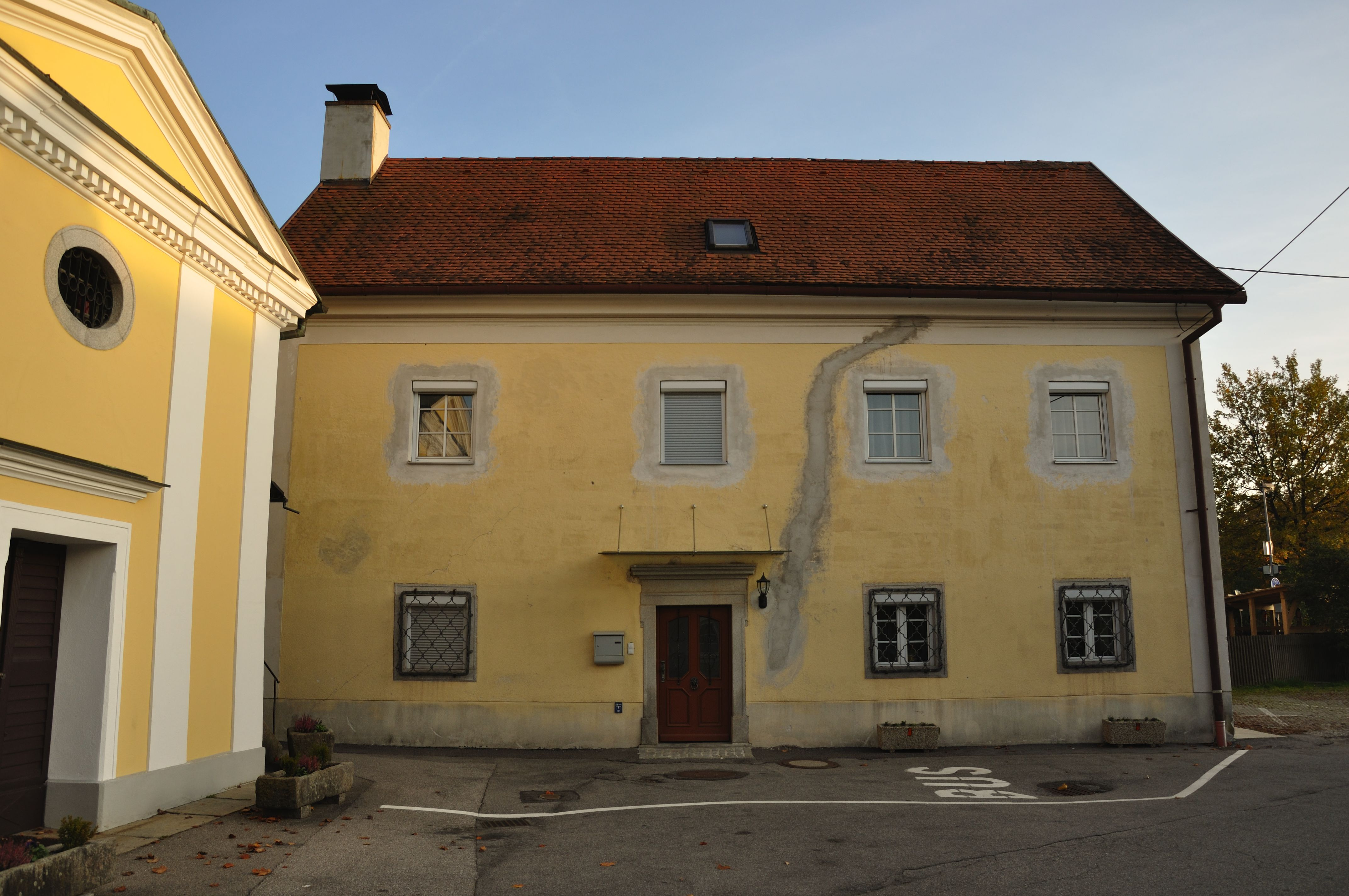 Wohnhaus, ehem. Pfarrhof